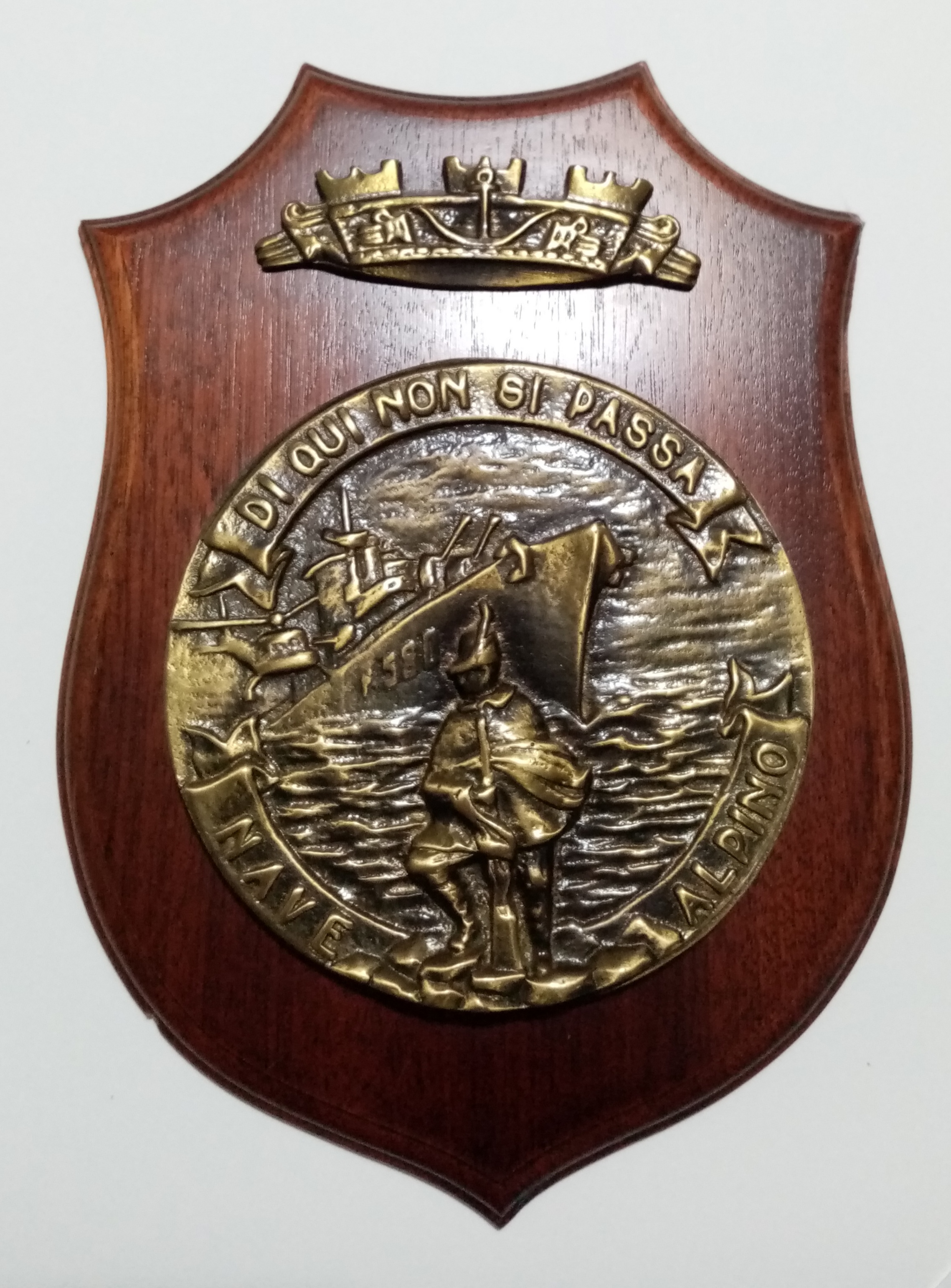 Crest della Fregata Alpino F580